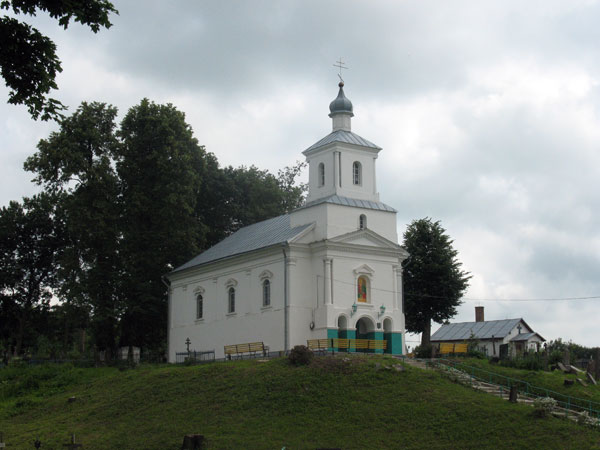 Сноў. Царква Святых Казьмы і Дзям'яна